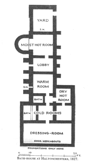 Planskizze der römischen Therme von Halton Chesters/Onnum, Zeichnung von 1827.